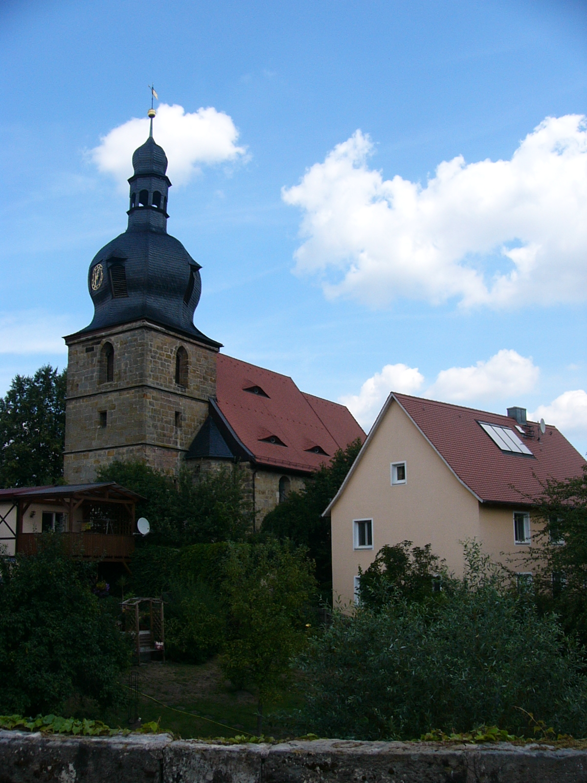 Ansichten der Johanneskirche in Kasendorf